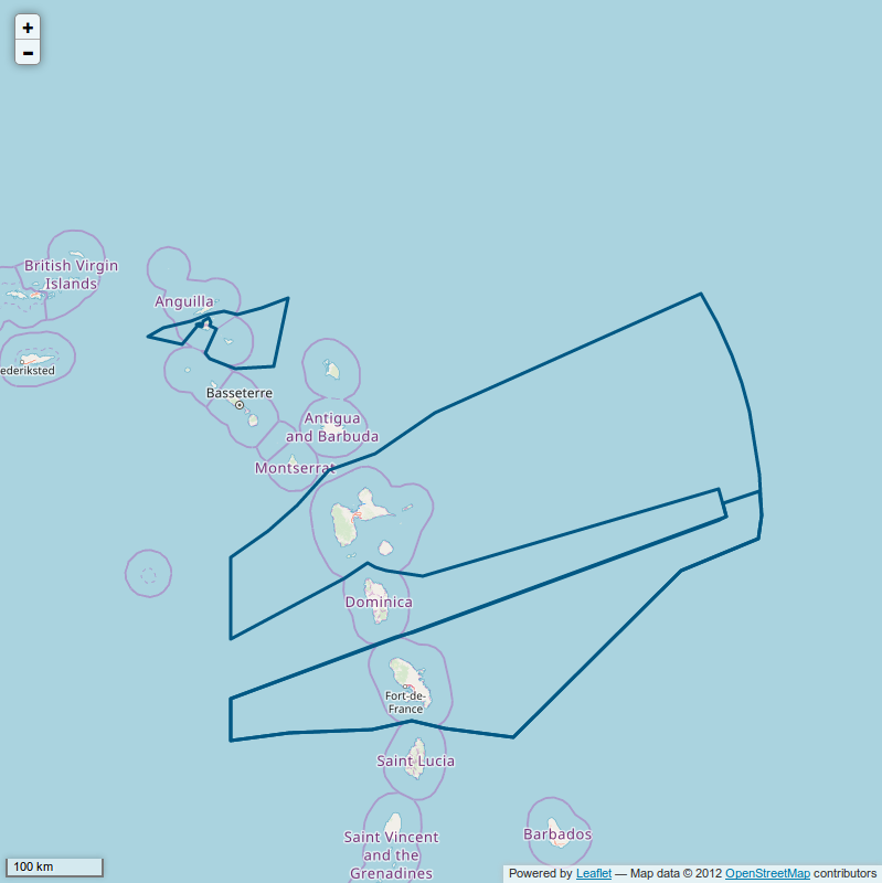 Périmètre du Sanctuaire Agoa.